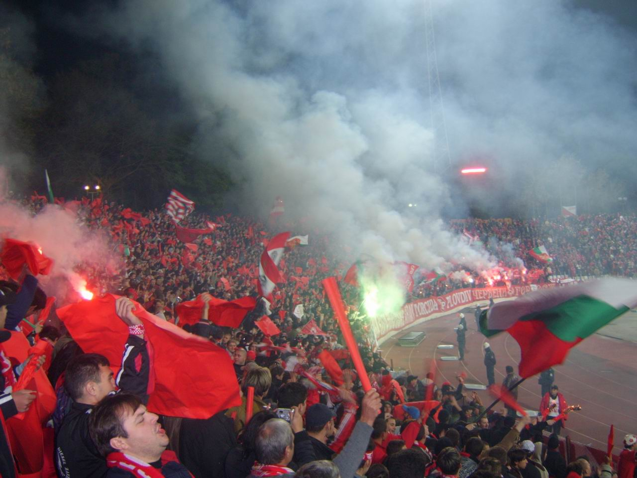 ст. Българска Армия преди мача с Хамбургер от група "А" на турнира за купата на УЕФА, сезон 2005/06.